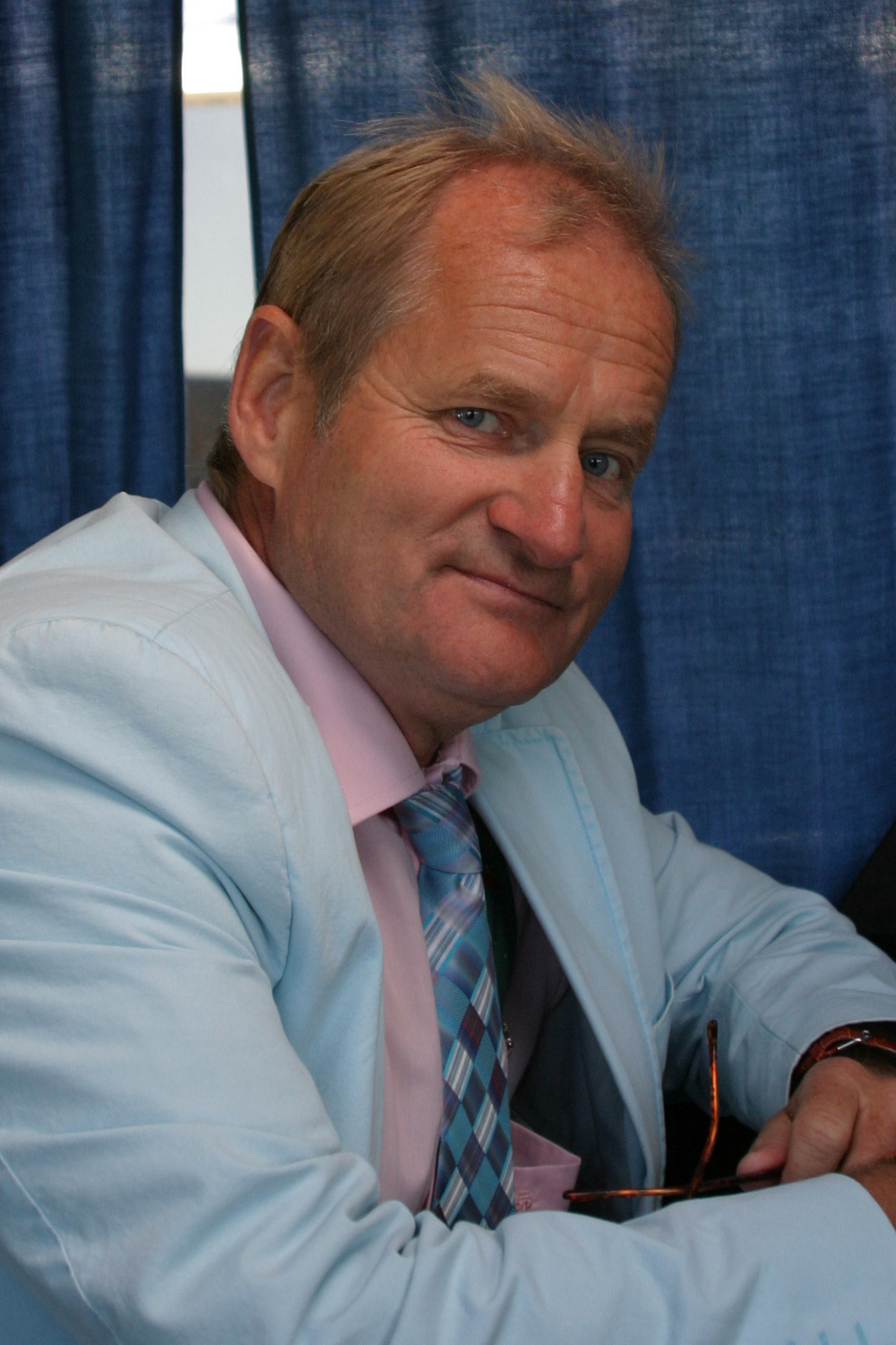 Klaus Thomasson jututtamassa Jukka Kuoppamäkeä Vihreät Niityt -iskelmätapahtumassa kesällä 2006.